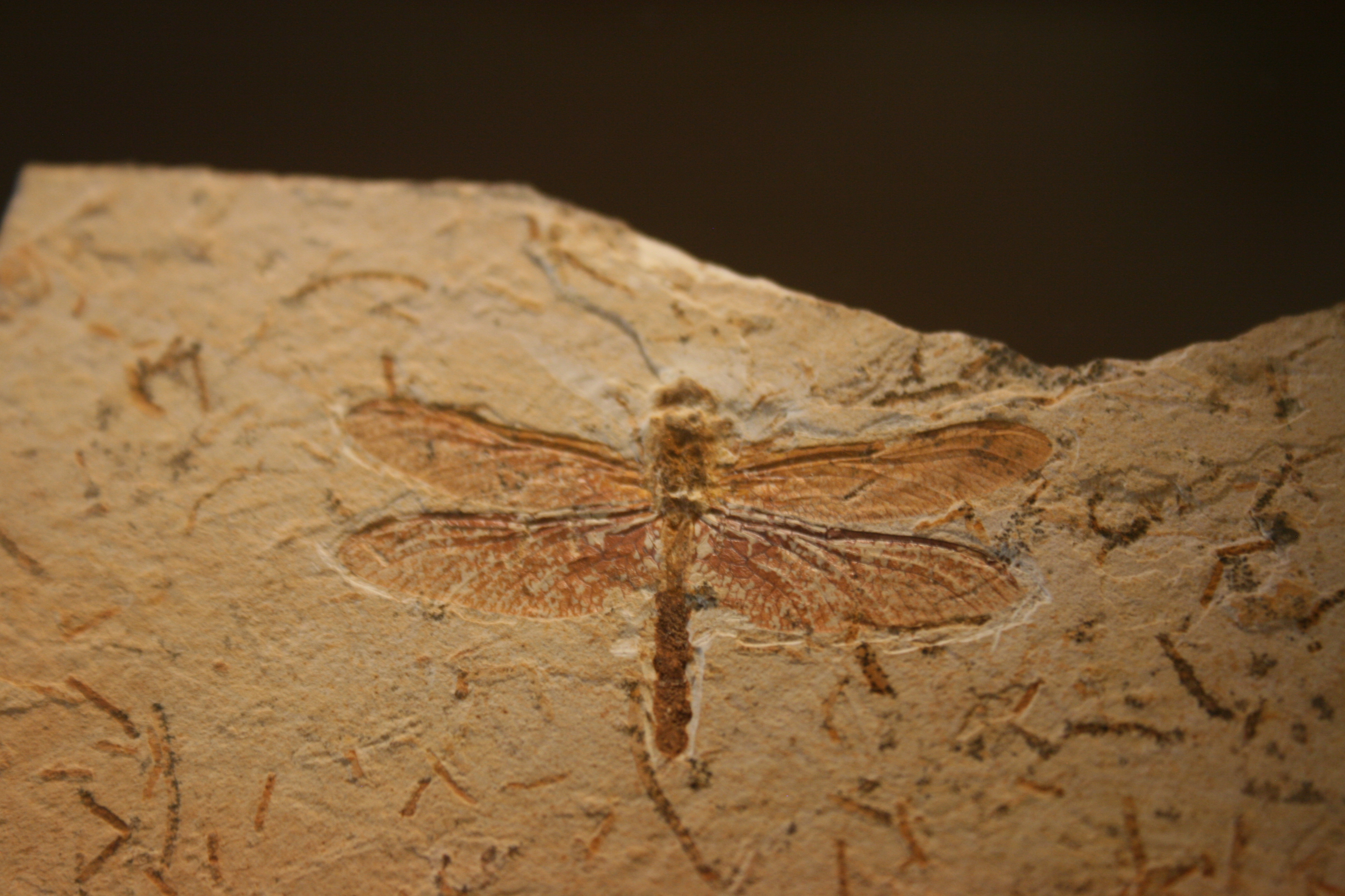 Fossil eines Cordulagomphus tuberculatus (syn - Gomphus tuberculatus) Aus dem Naturhistorischem Museum Wien